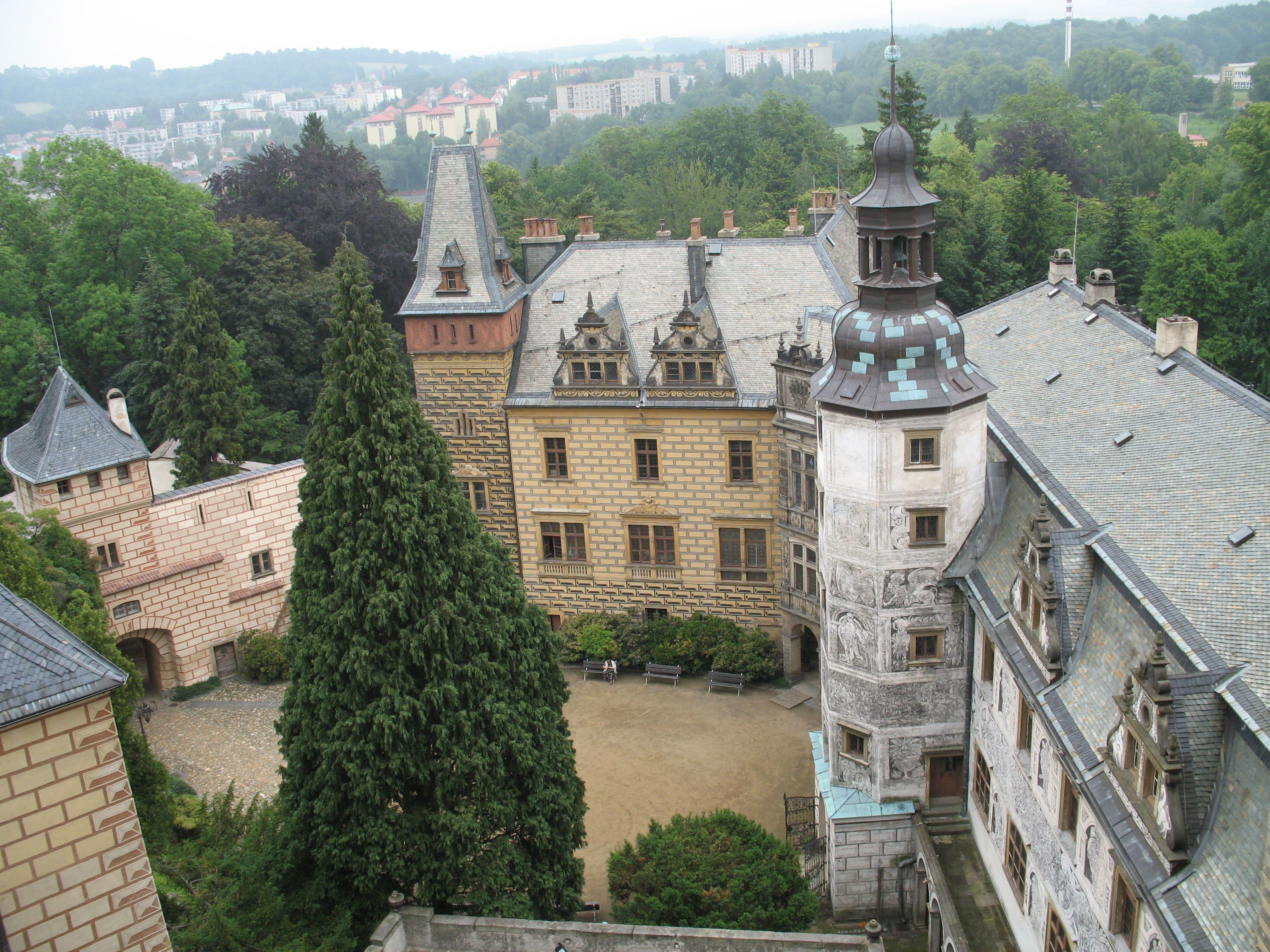 Hrad a zámek Frýdlant. Pohled od hradu na zámecké nádvoří s Dolním zámkem a Kastelánským křídlem